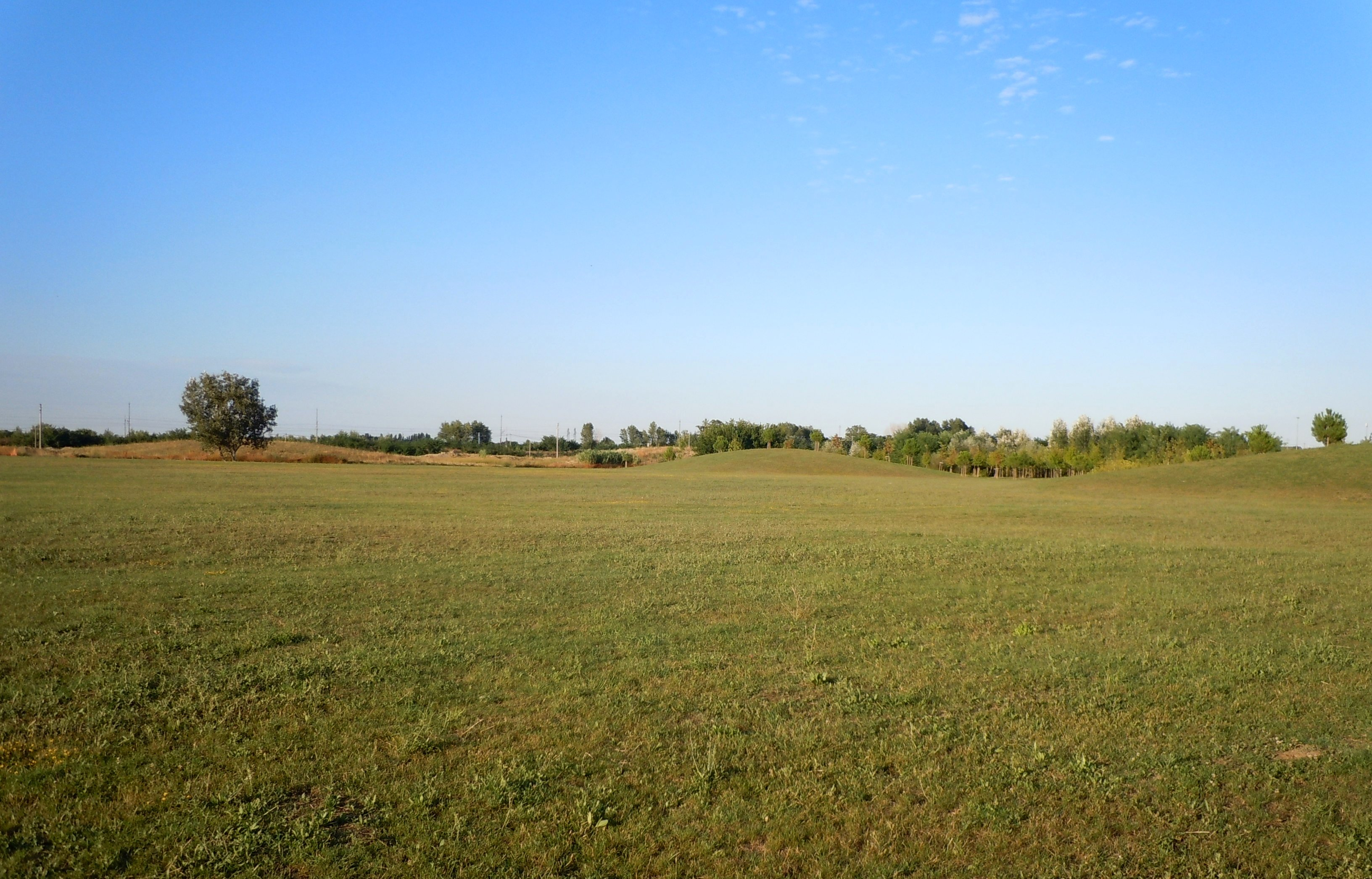 Cesena (FC, Italy): Parco Urbano dell'Ippodromo